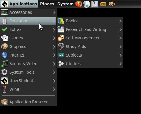 O menu Educação no UberStudent 1.0 Cicero Full (DVD) Edition, utilizando o GNOME 2.32.